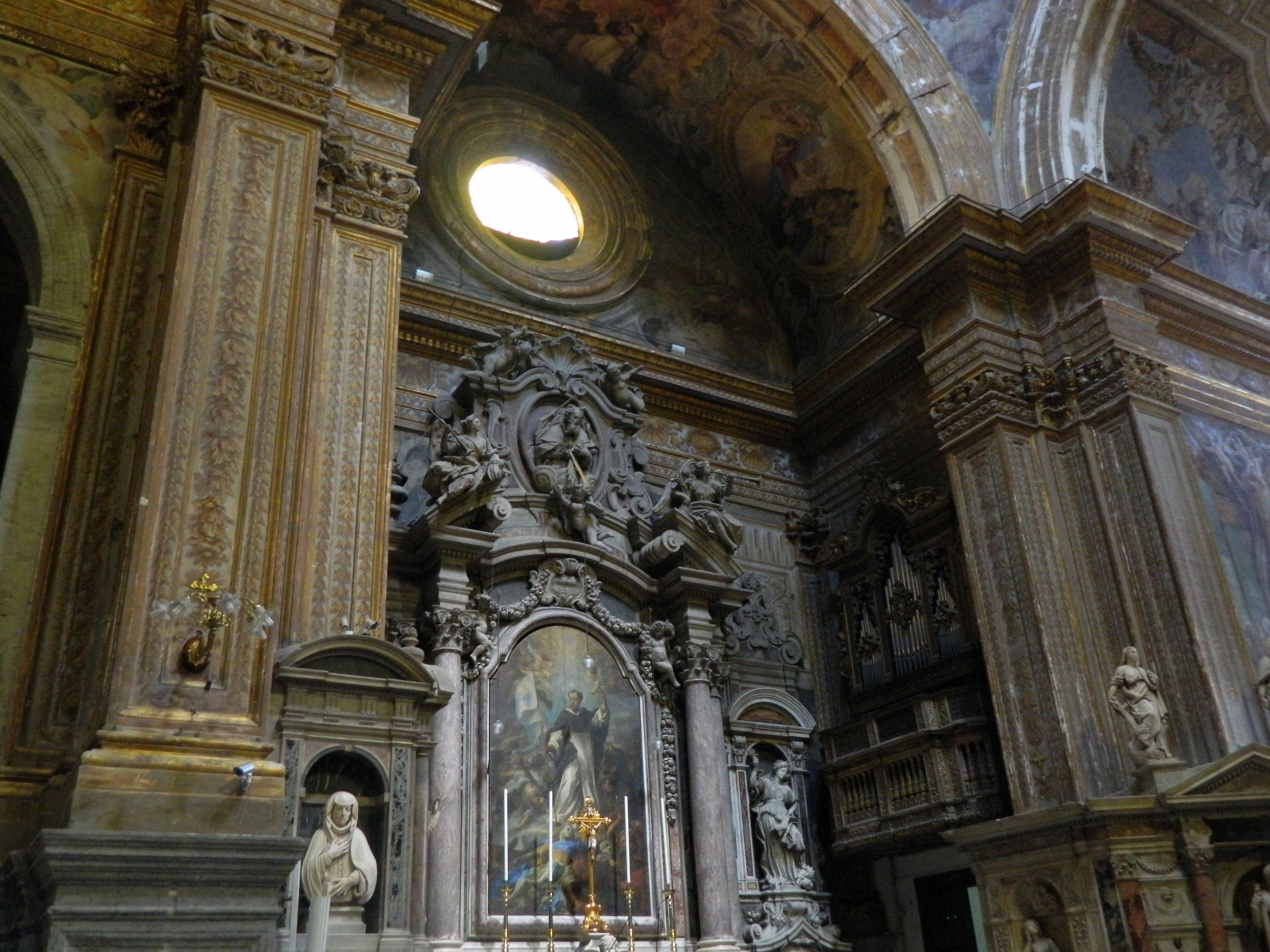 Chiesa di Santa Caterina a Formiello (Napoli) - transetto sinistro, sculture di Lorenzo Fontana (su disegno di Ferdinando Sanfelice) e tela di Giacomo del Po